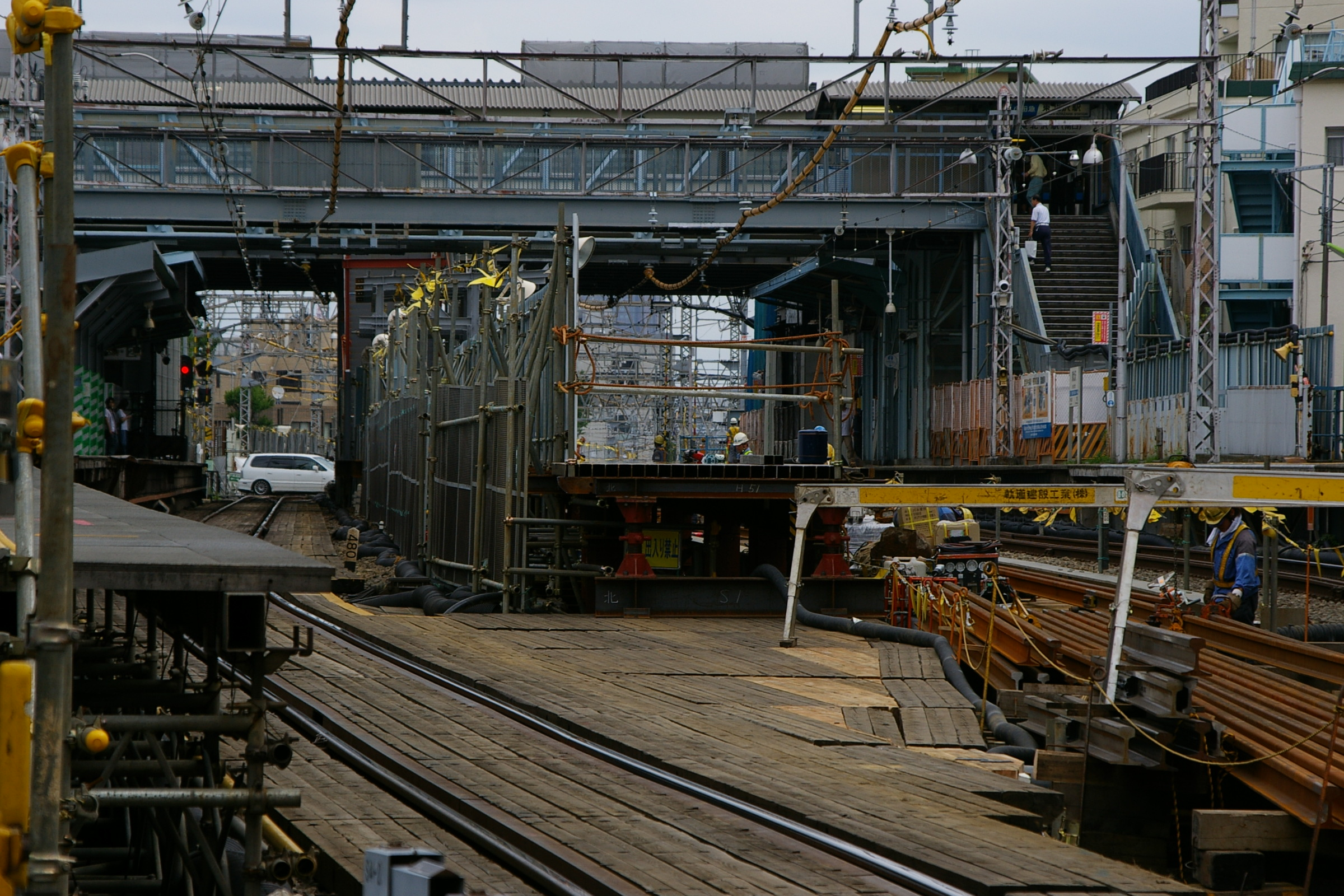 ファイルの概要 工事の進む東北沢駅（2006年9月23日撮影）